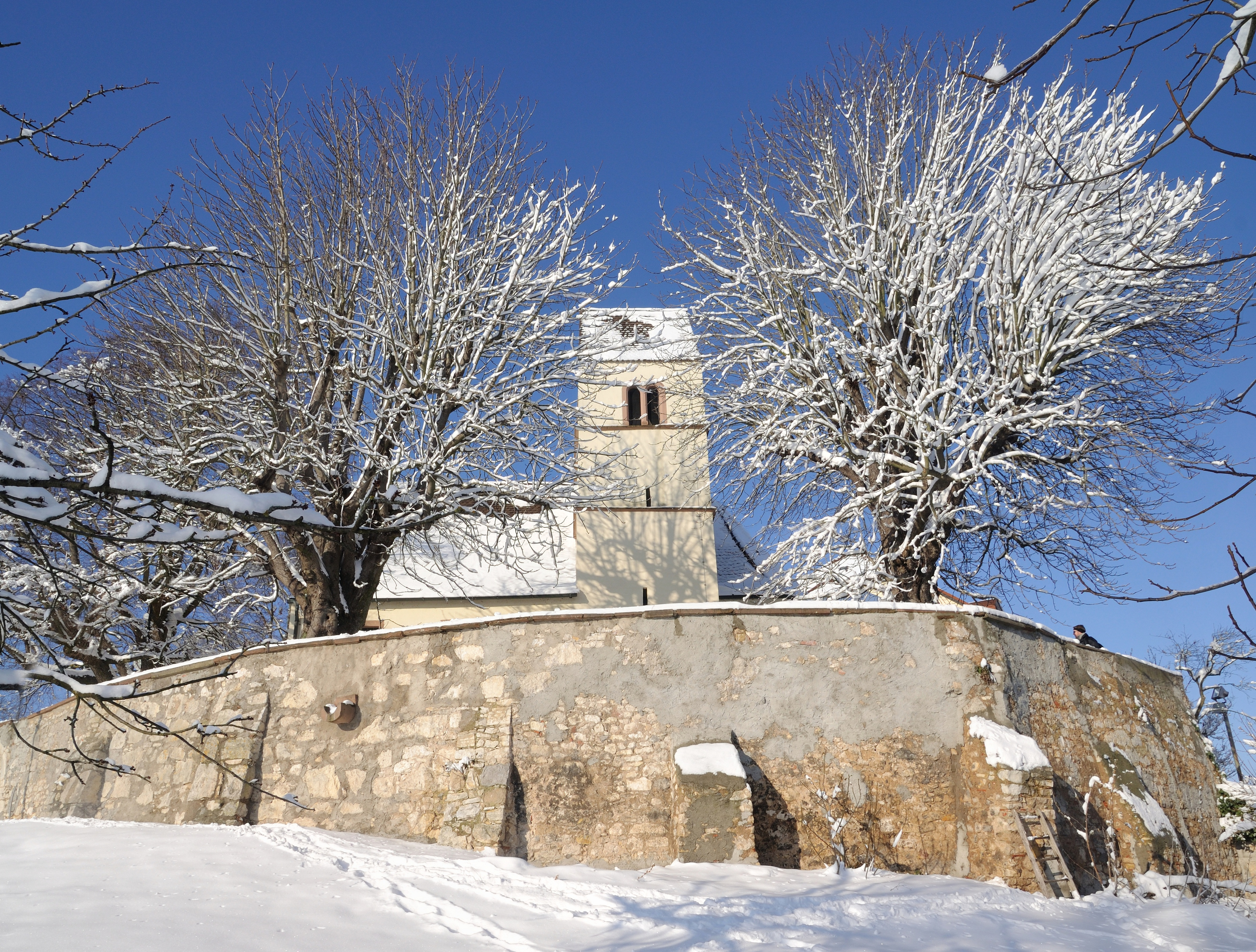 Lörrach-Tüllingen: Ottilienkirche im Winter